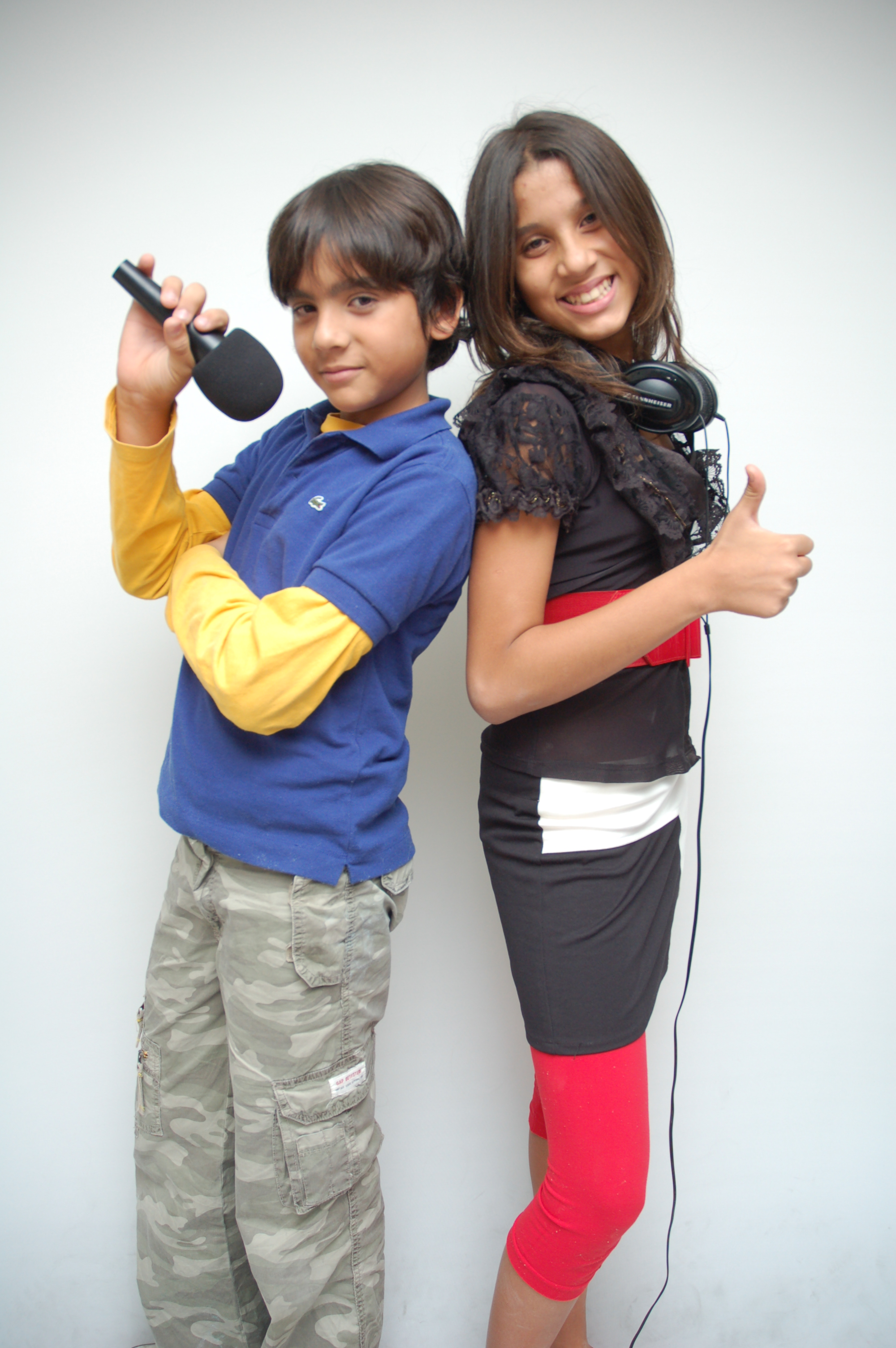 Fotografía que sirvió como portada para una edición especial de la revista Estampas Oriental de la Nueva Prensa de Oriente en el estado Anzoátegui.